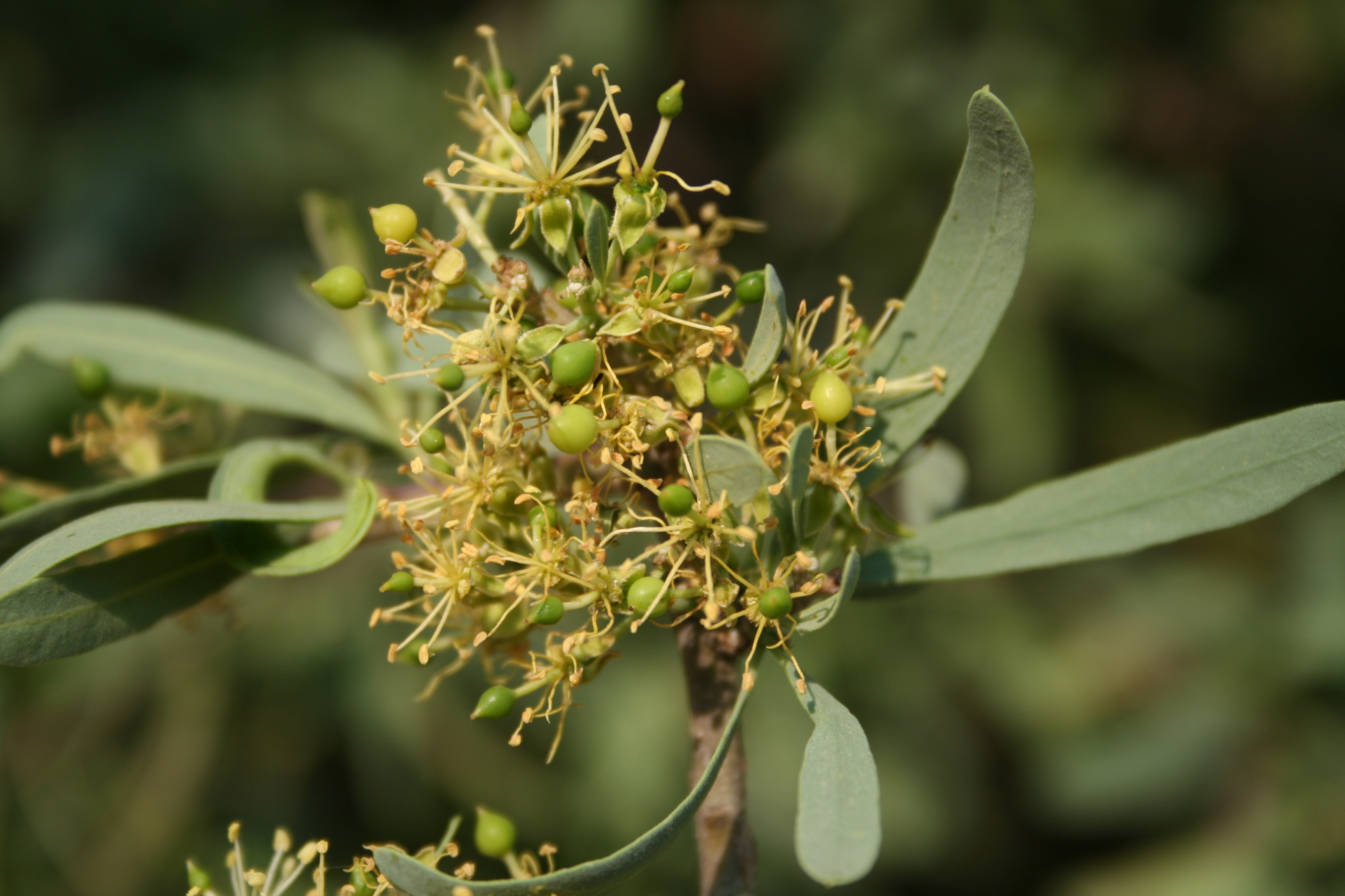 Boscia albitrunca, Namibia